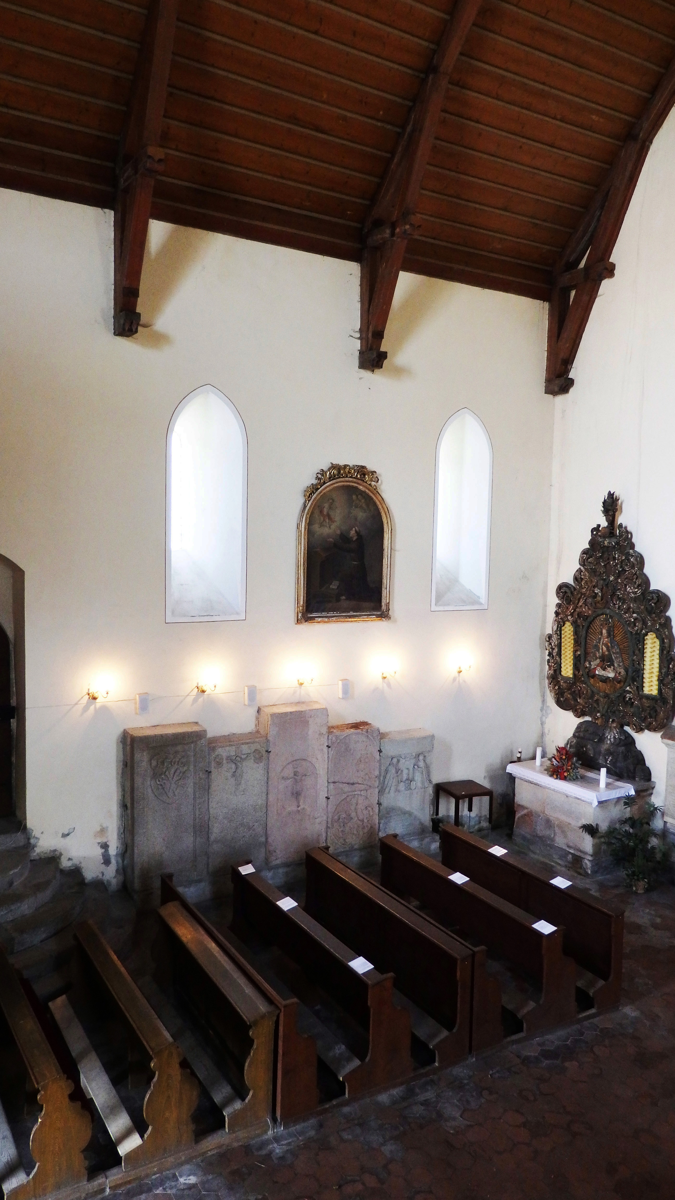 Severní zeď